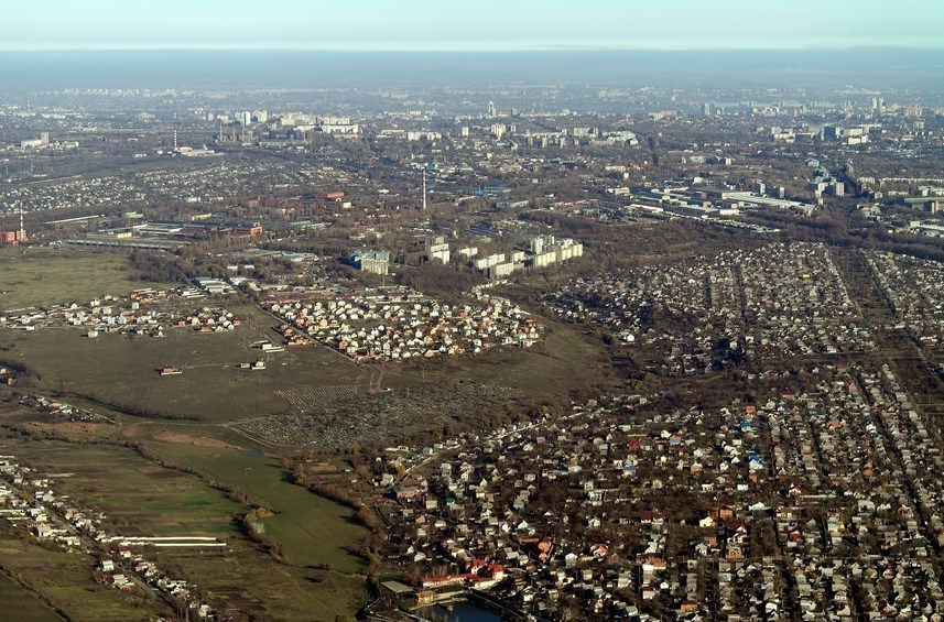 Вигляд